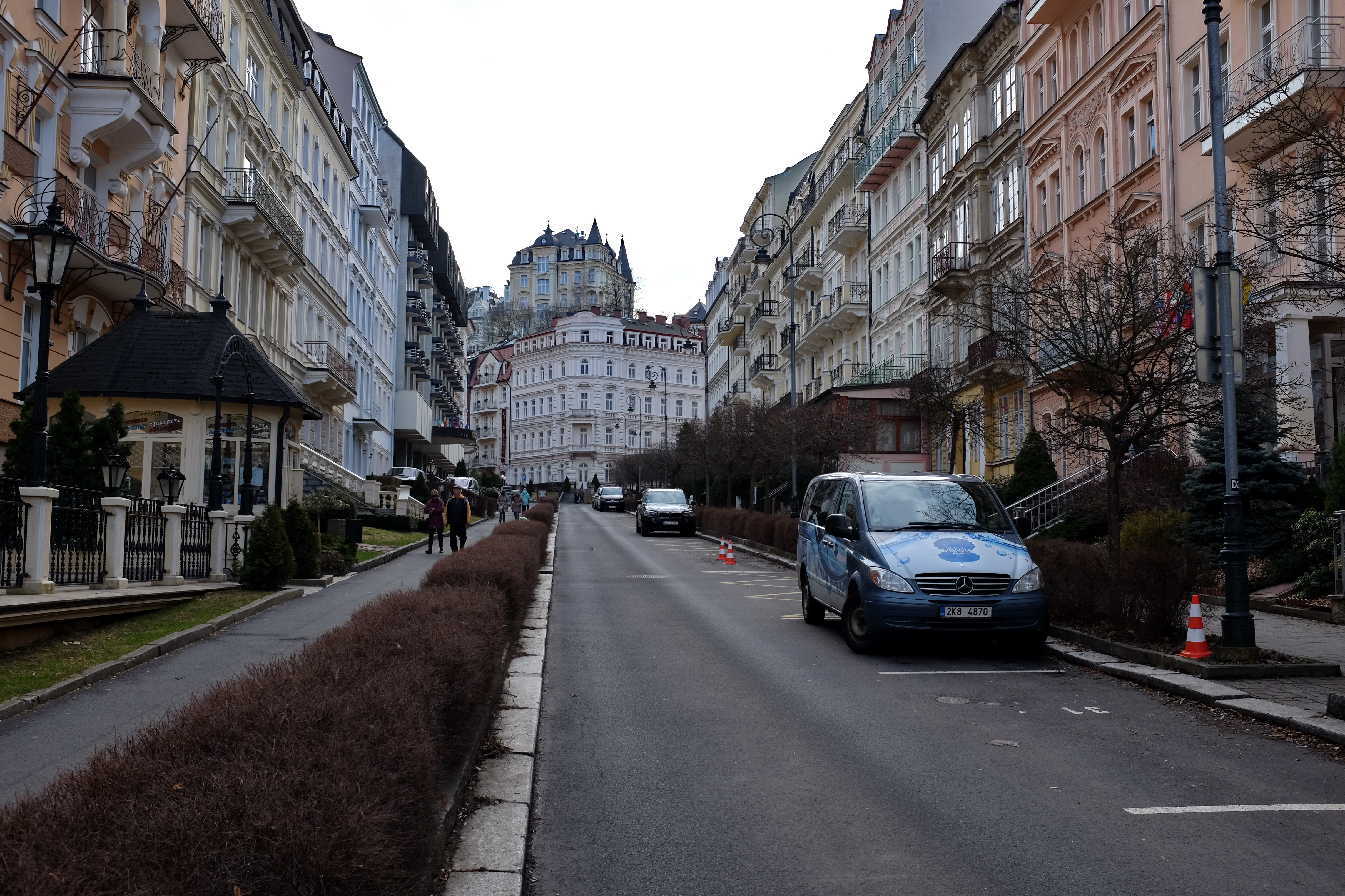 Karlovy Vary, Sadová ulice